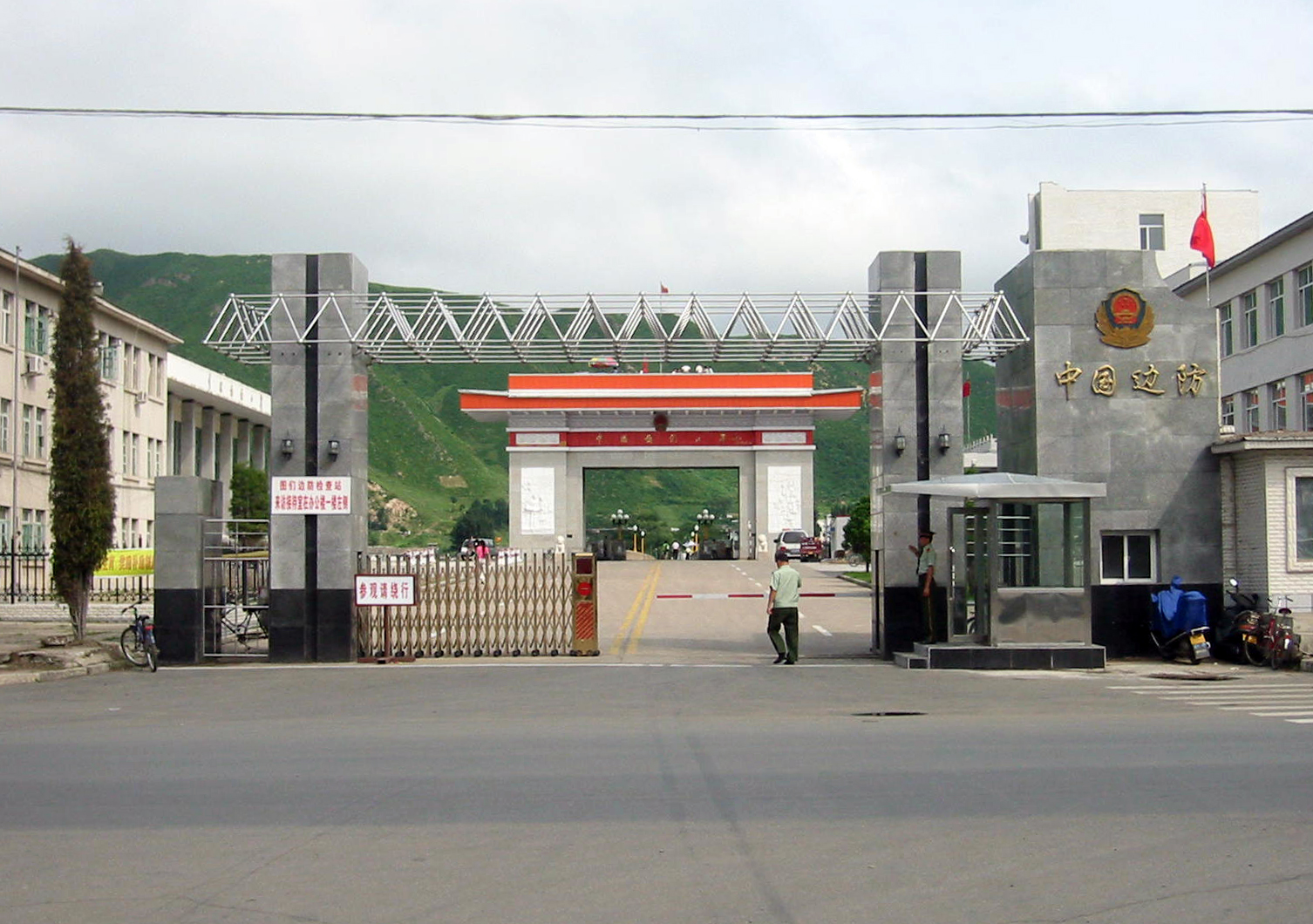 图们口岸